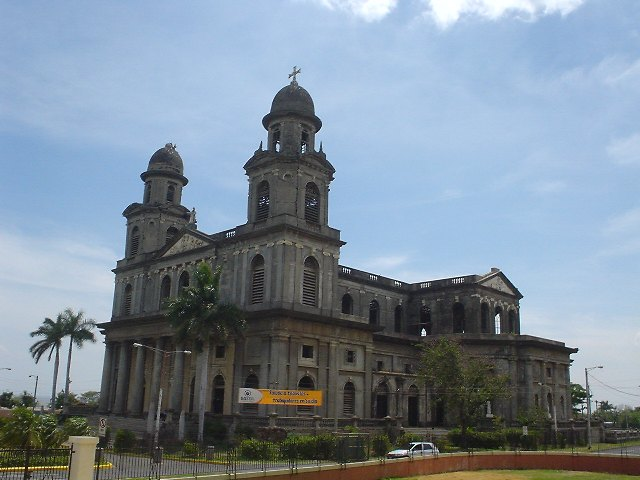 Kathedrale in Managua